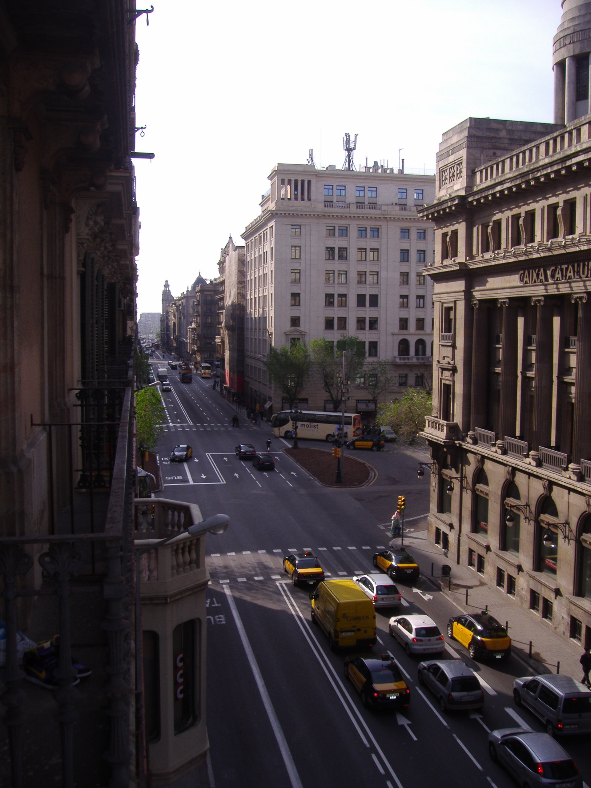 Via Laietana, Barcalona